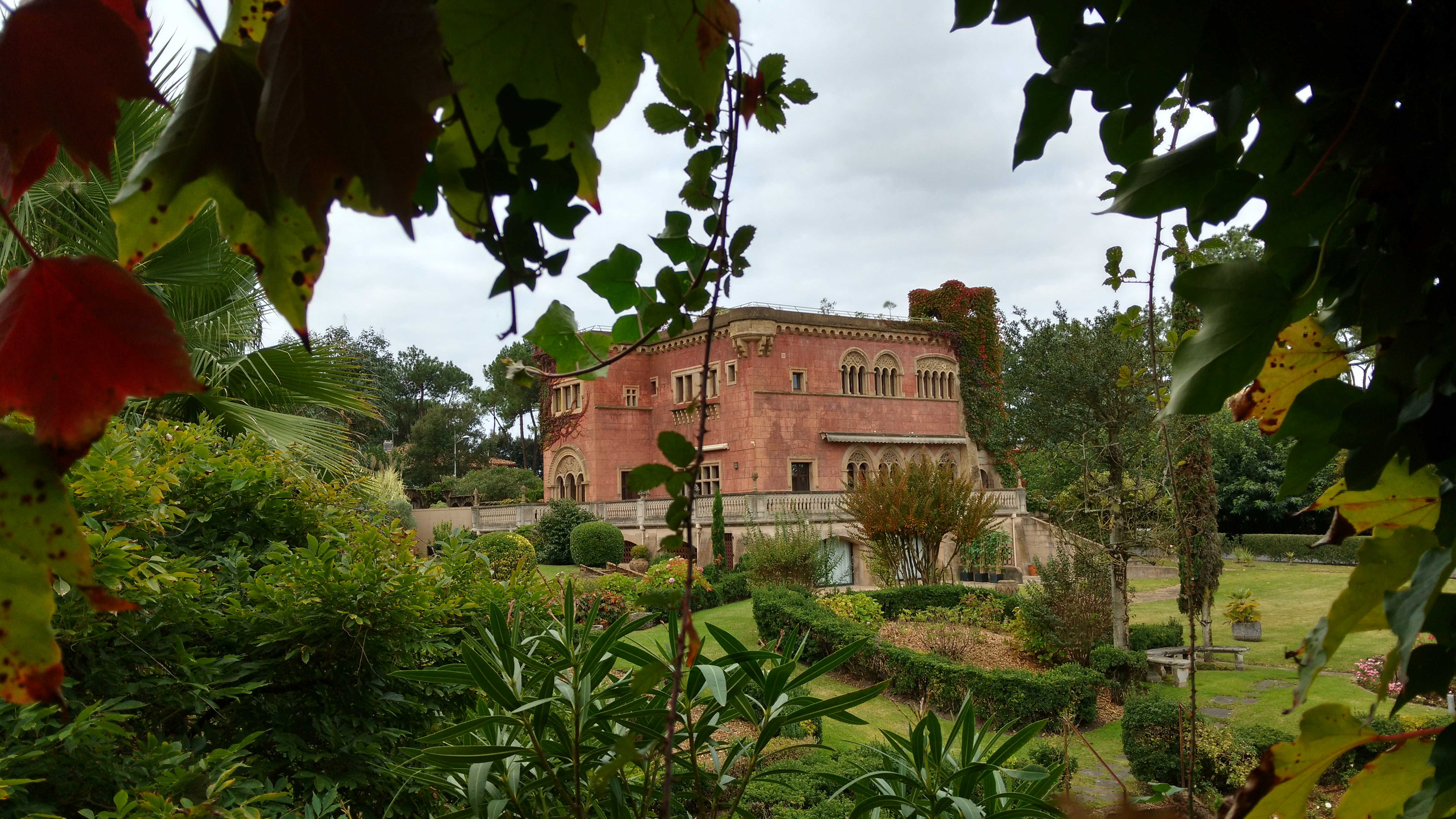 Villa Prinkipo à Anglet dans les Pyrénées-Atlantique en France